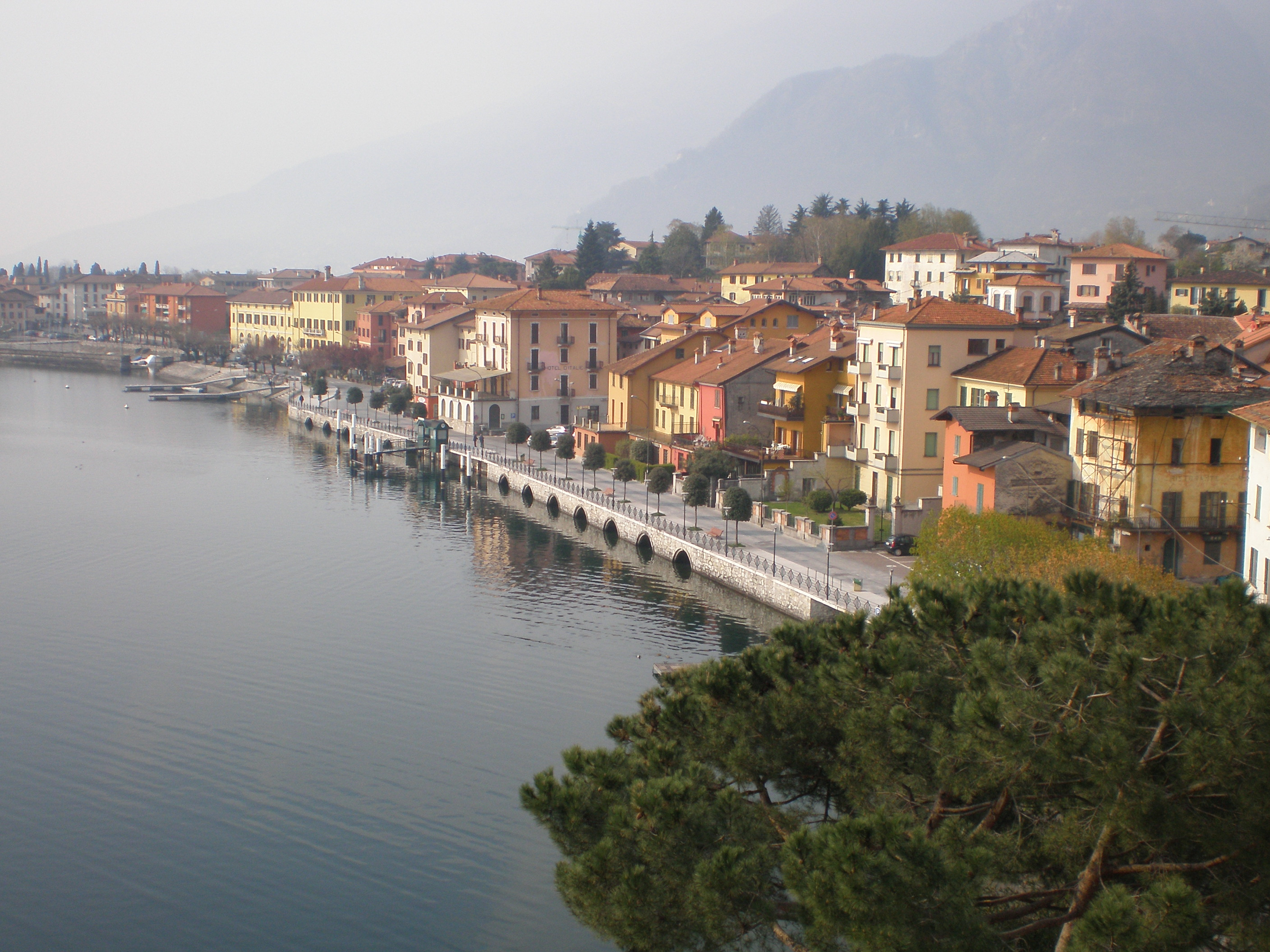 Lungolago di Gravedona, provincia di Como